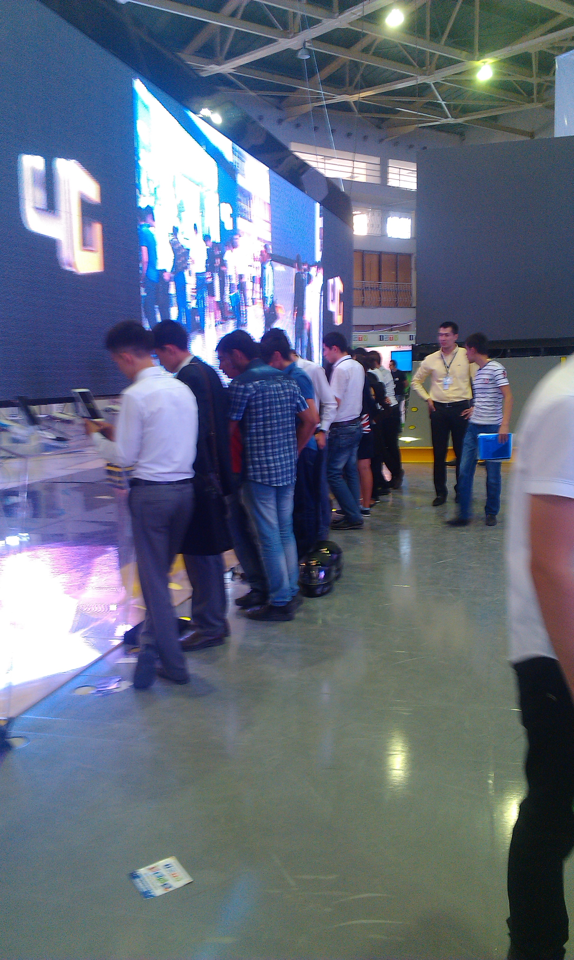 4G в Узбекистане